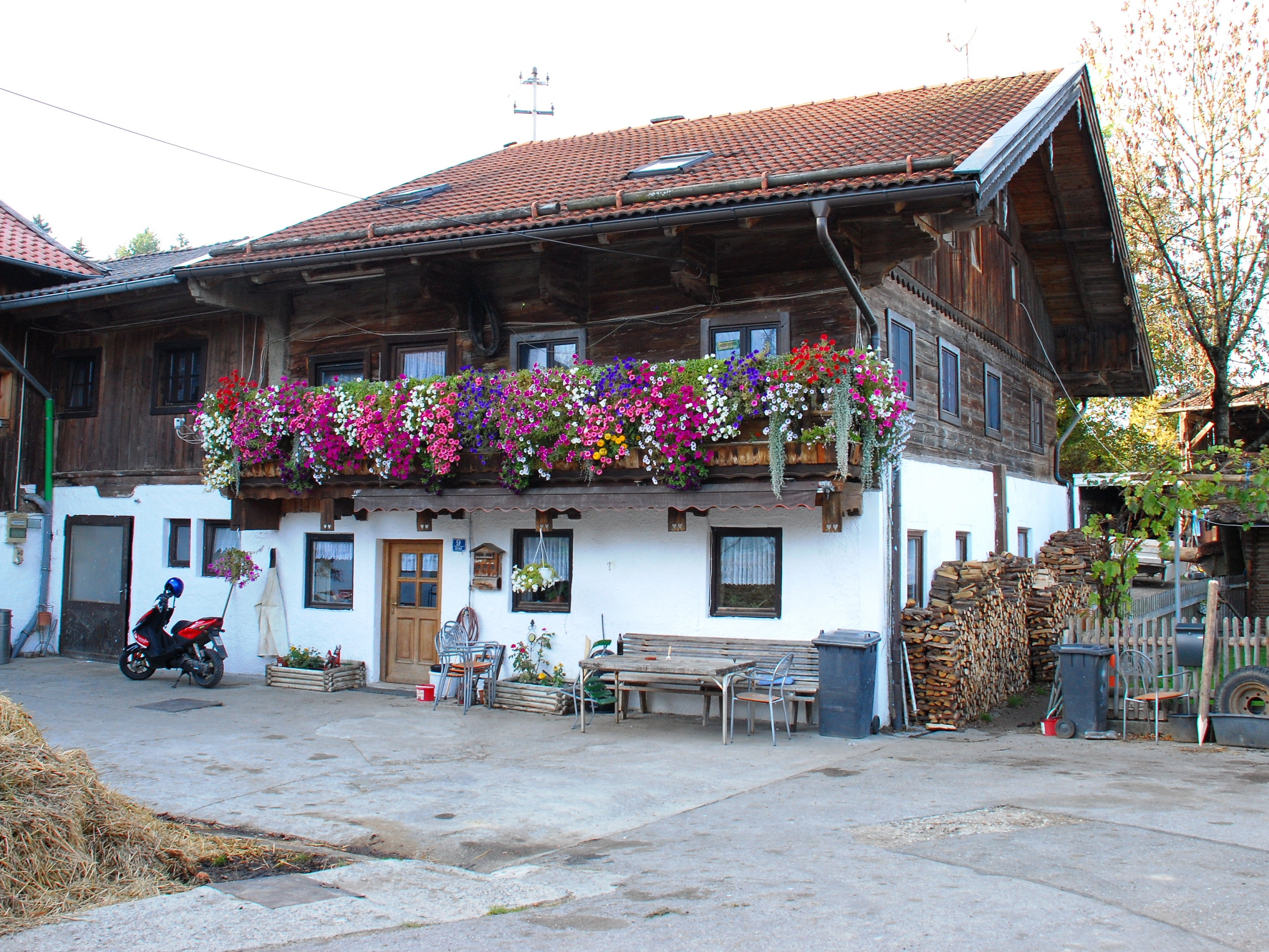 Bauernhof "Beim Gretzl" in Graß, Ortsteil von Aying, Landkreis München, Regierungsbezirk Oberbayern, Bayern. Als Baudenkmal unter Aktennummer D-1-84-137-29 in der Bayerischen Denkmalliste aufgeführt. Bild gemäß den Vorgaben zur Panoramafreiheit von öffentlichem Verkehrsgrund aus aufgenommen.